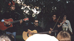 Den förlorade generationen under en "alternativ" spelning på Trästockfestivalen 1998.